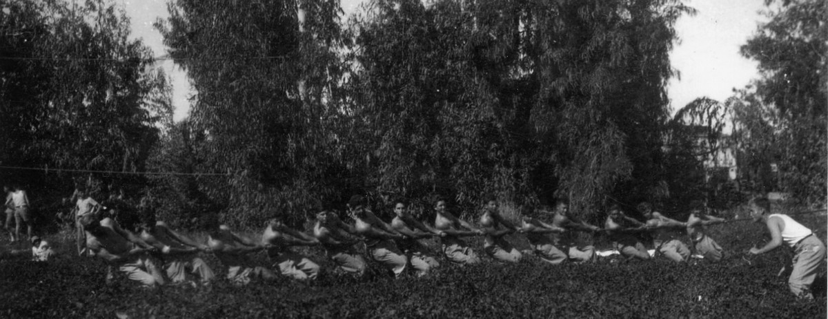 פלוגה ה הדרומית - גרעין ד' - מכבי צעיר - גבעת חיים 10.1946-1947 - אימונים במשיכת חבל